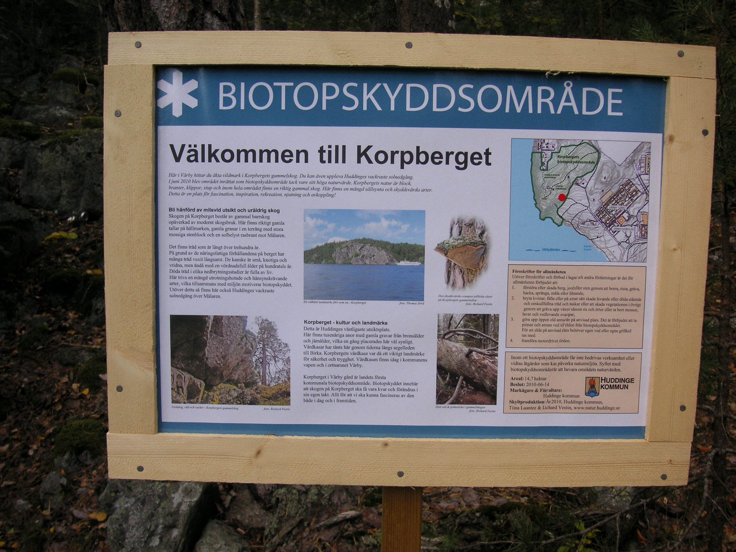 Informationsskylt Korpberget "Biotopsskyddsområde"